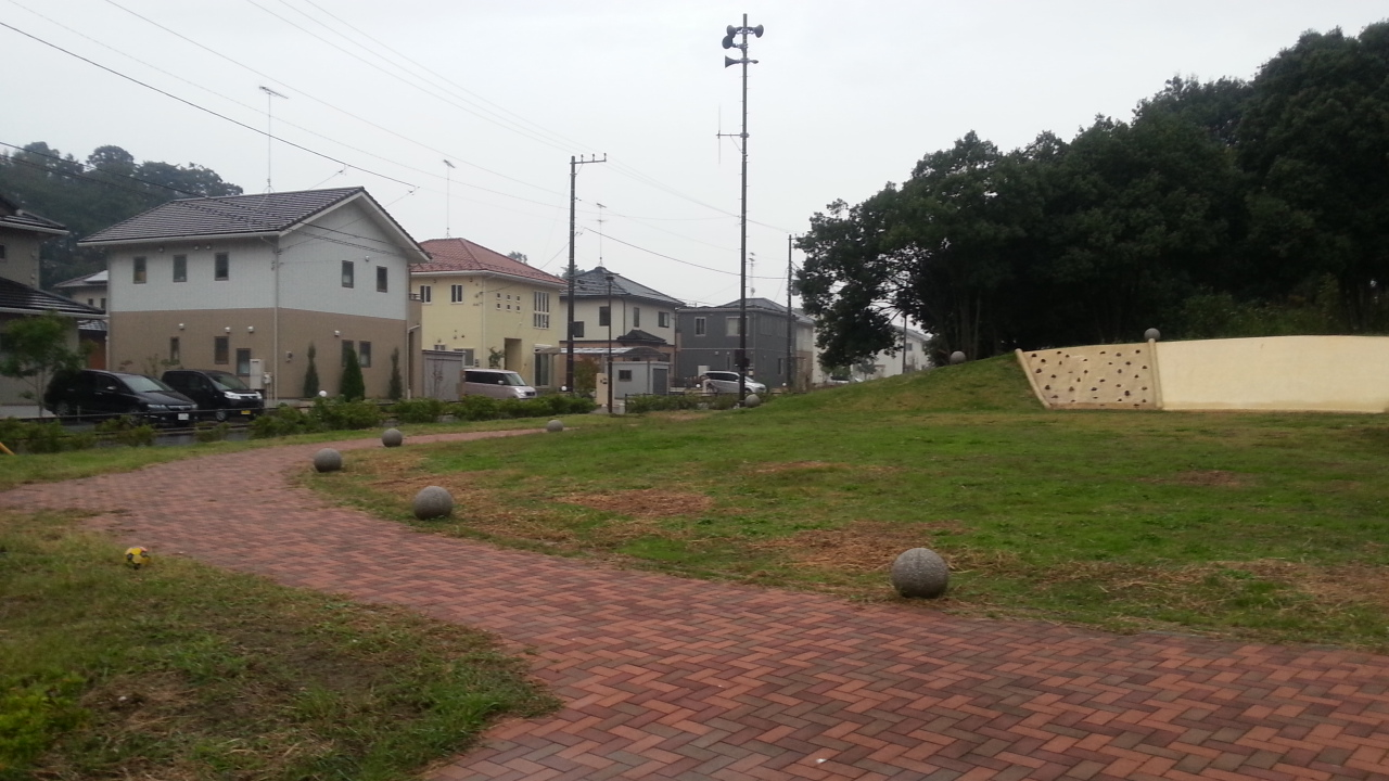 土浦市中 4